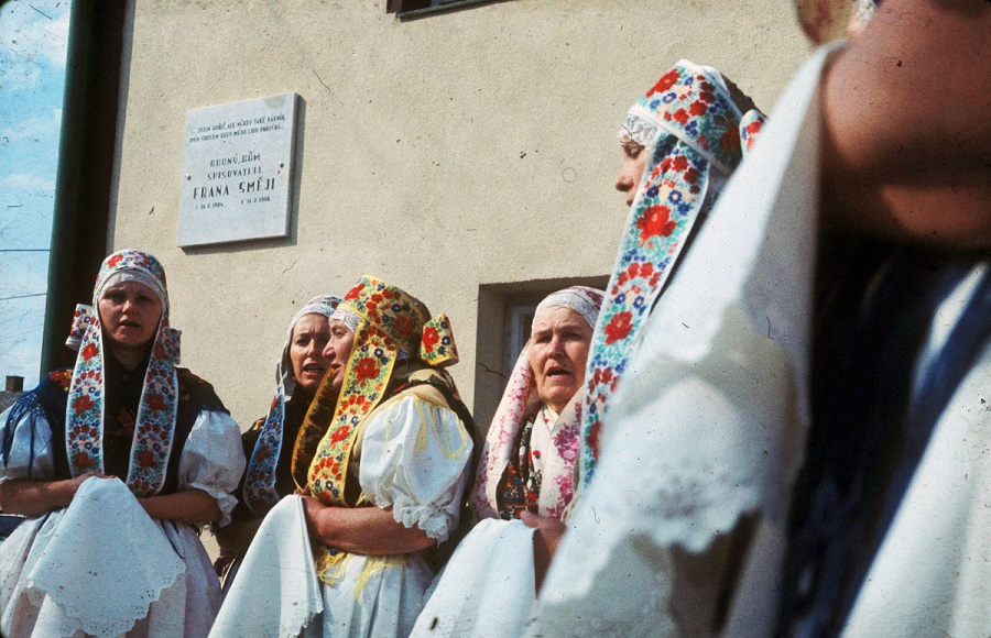 Památní deska Fráni Směja v Suchých Lazcích